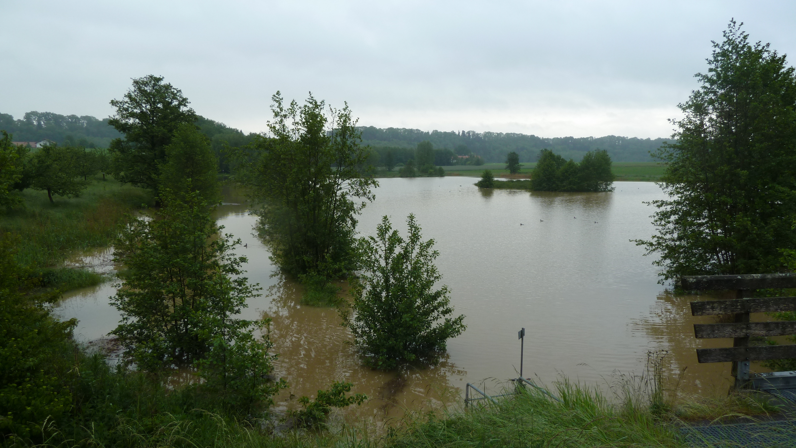 Flossinger Hochwasserrückhaltebecken in leicht überstautem Zustand am 2./3. Juni 2013